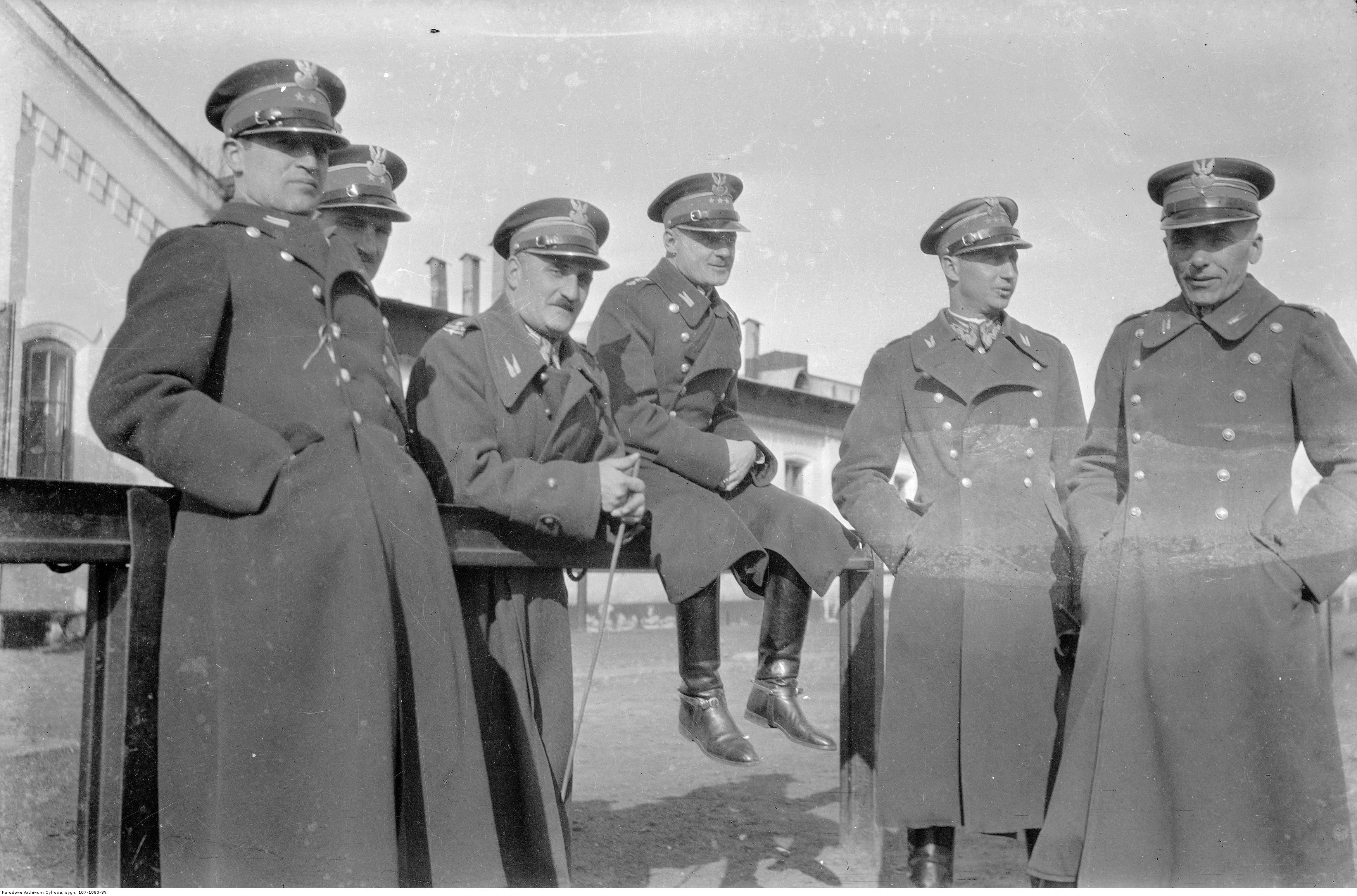 Oficerowie Pułku w koszarach. 1. z lewej por. Franciszek Flatau. 1. z prawej mjr Janusz Albrecht.